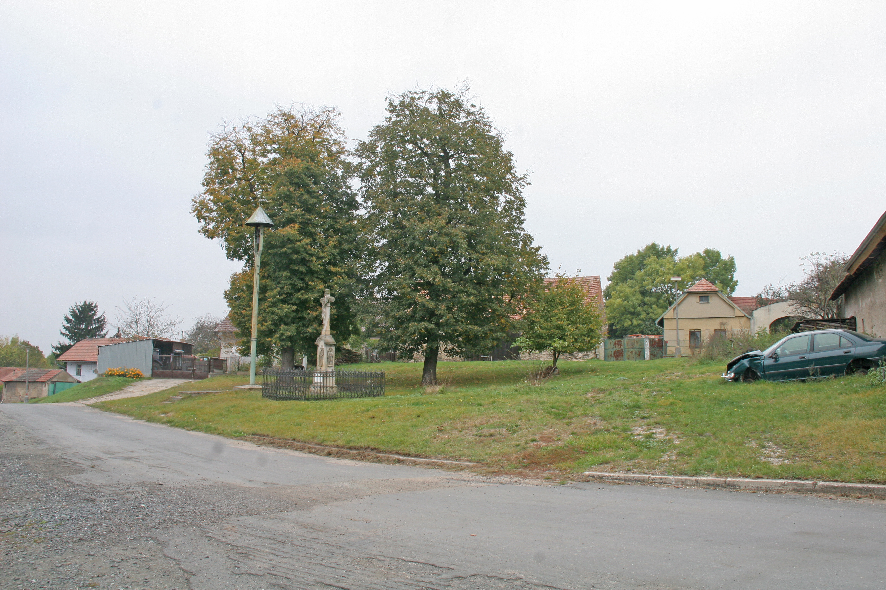 Božec náves